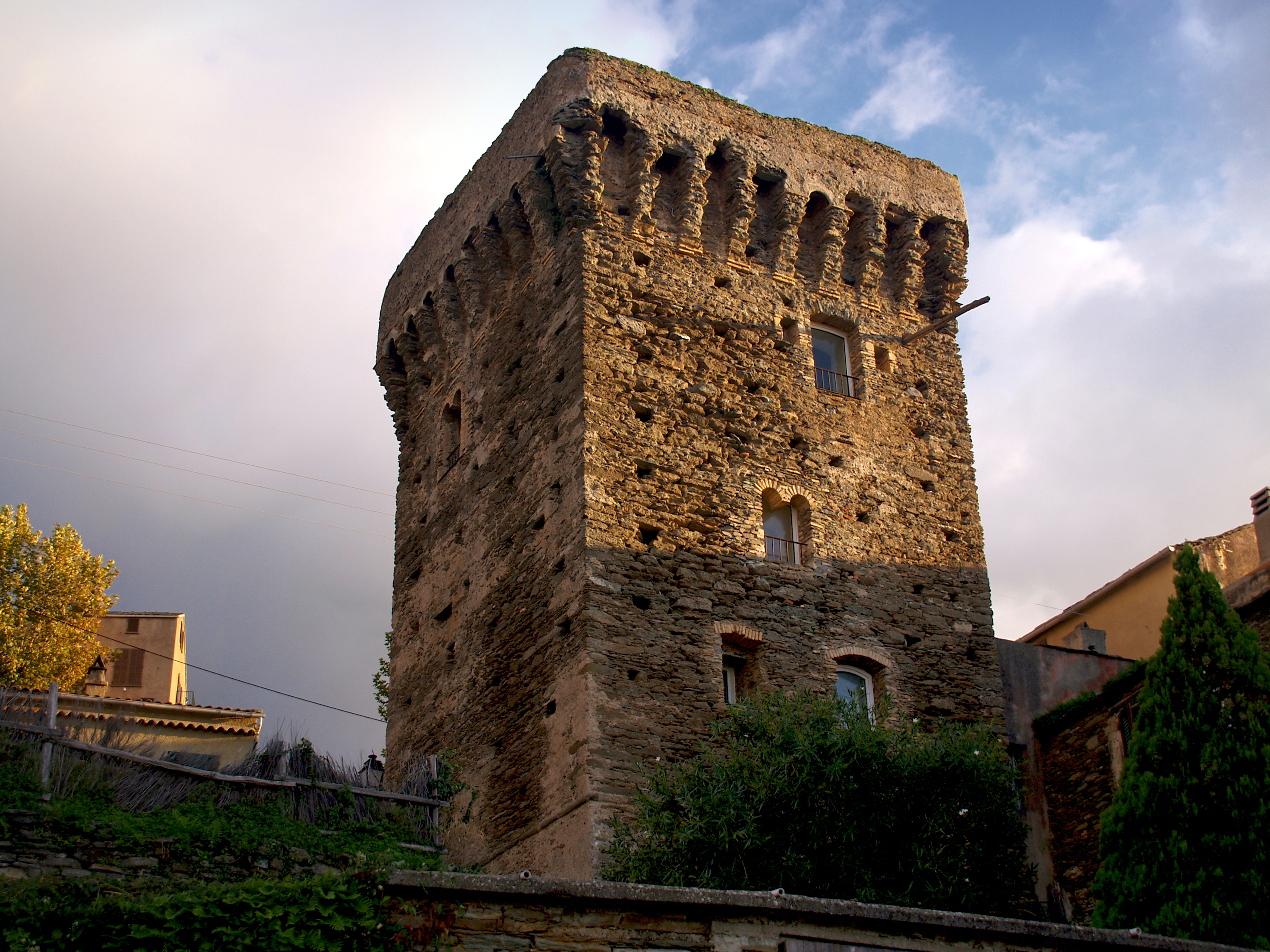 Pino (Corsica) - Maison-tour pisane de Ciocce